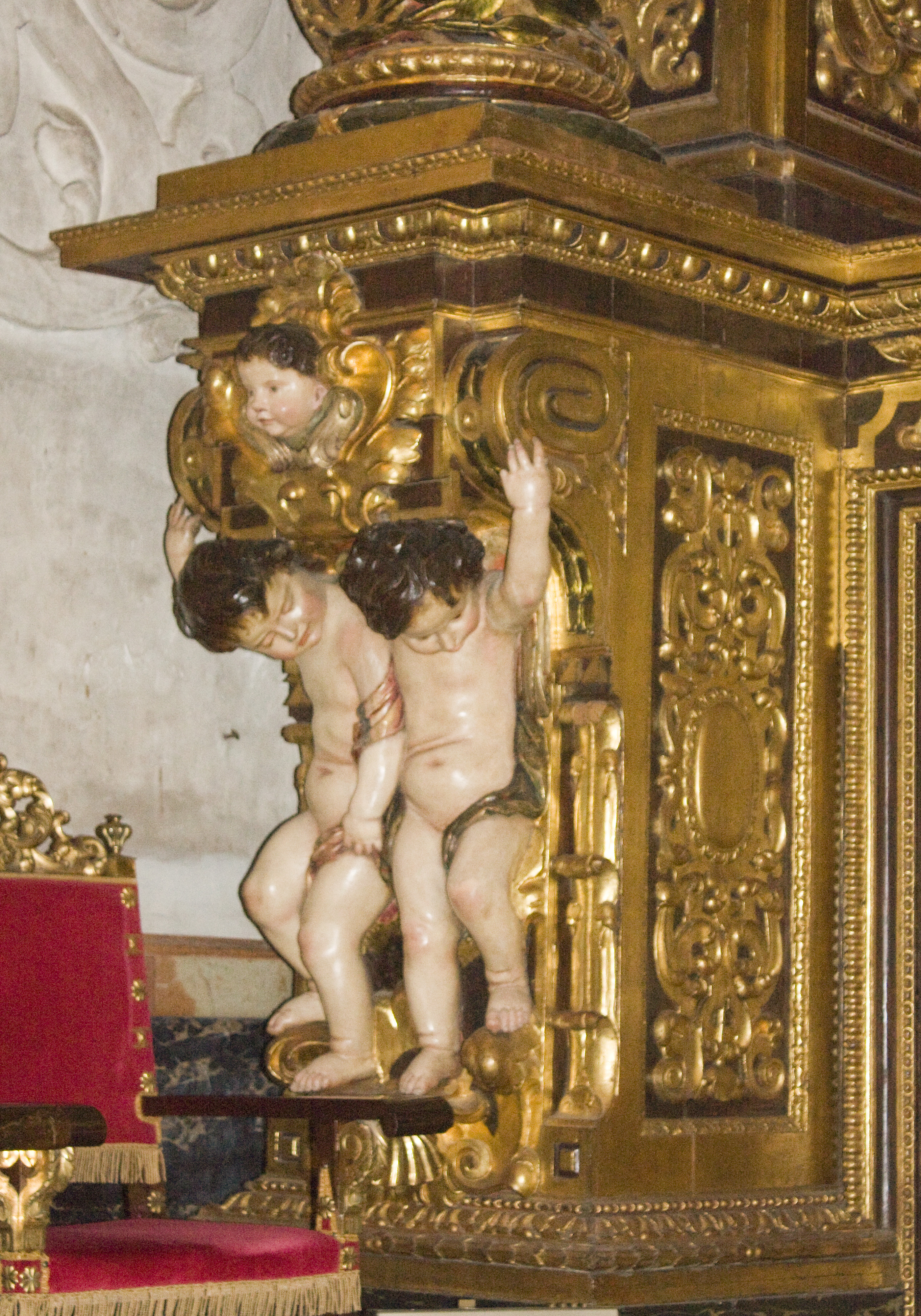 Anges baroques, ornemant de socles de colonnes du retable du maître-autel.